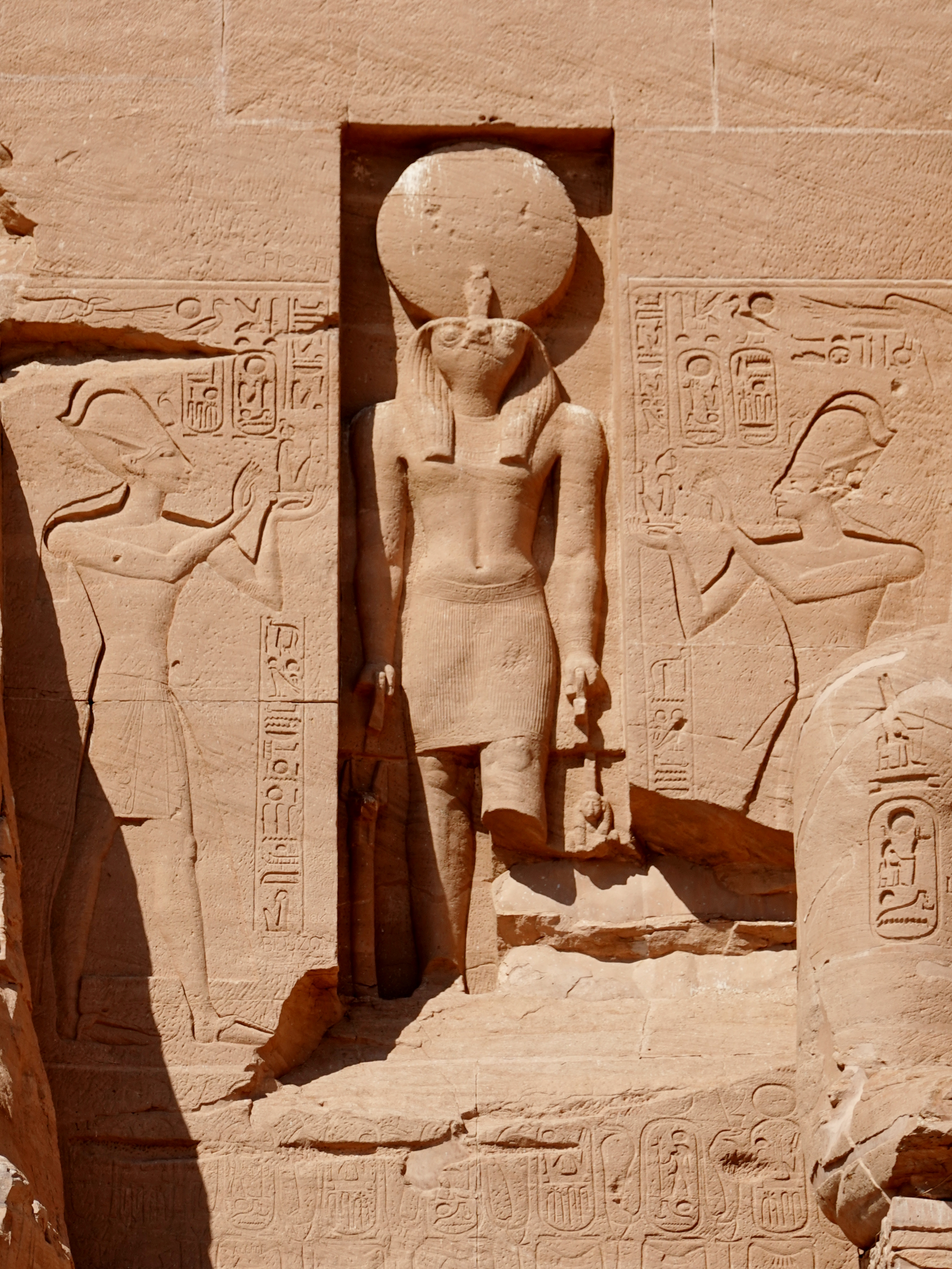 Darstellung von Re-Harachte oberhalb des Eingangs am Großen Tempel von Abu Simbel, Ägypten